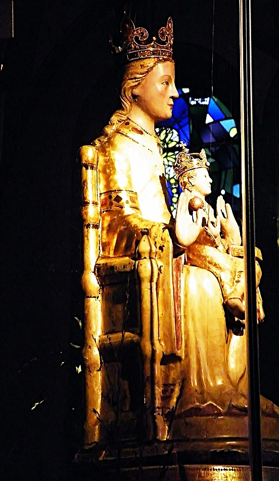 Werl Basilika Gnadenbild Seitenansicht